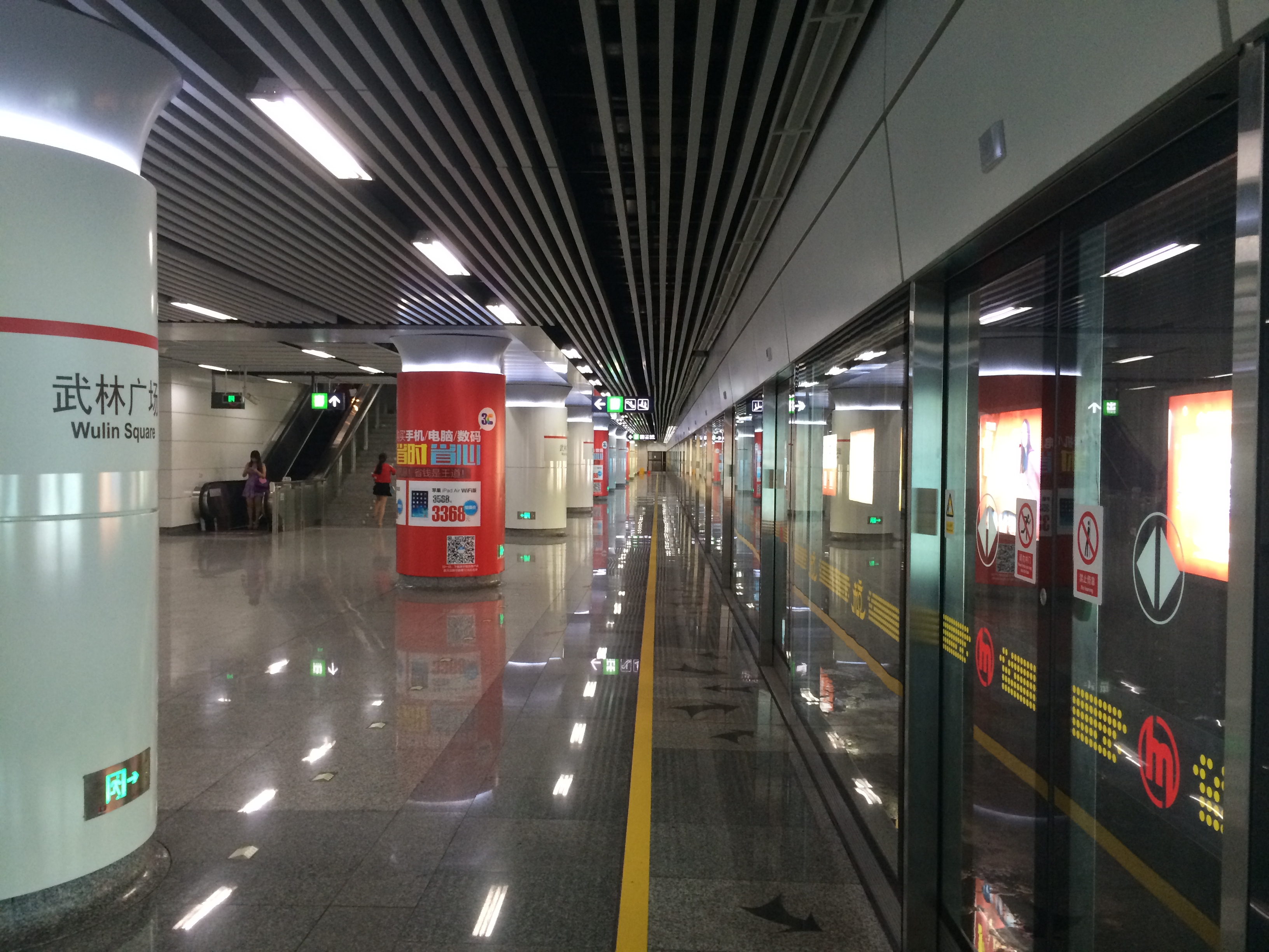 3号线武林广场站预留站台